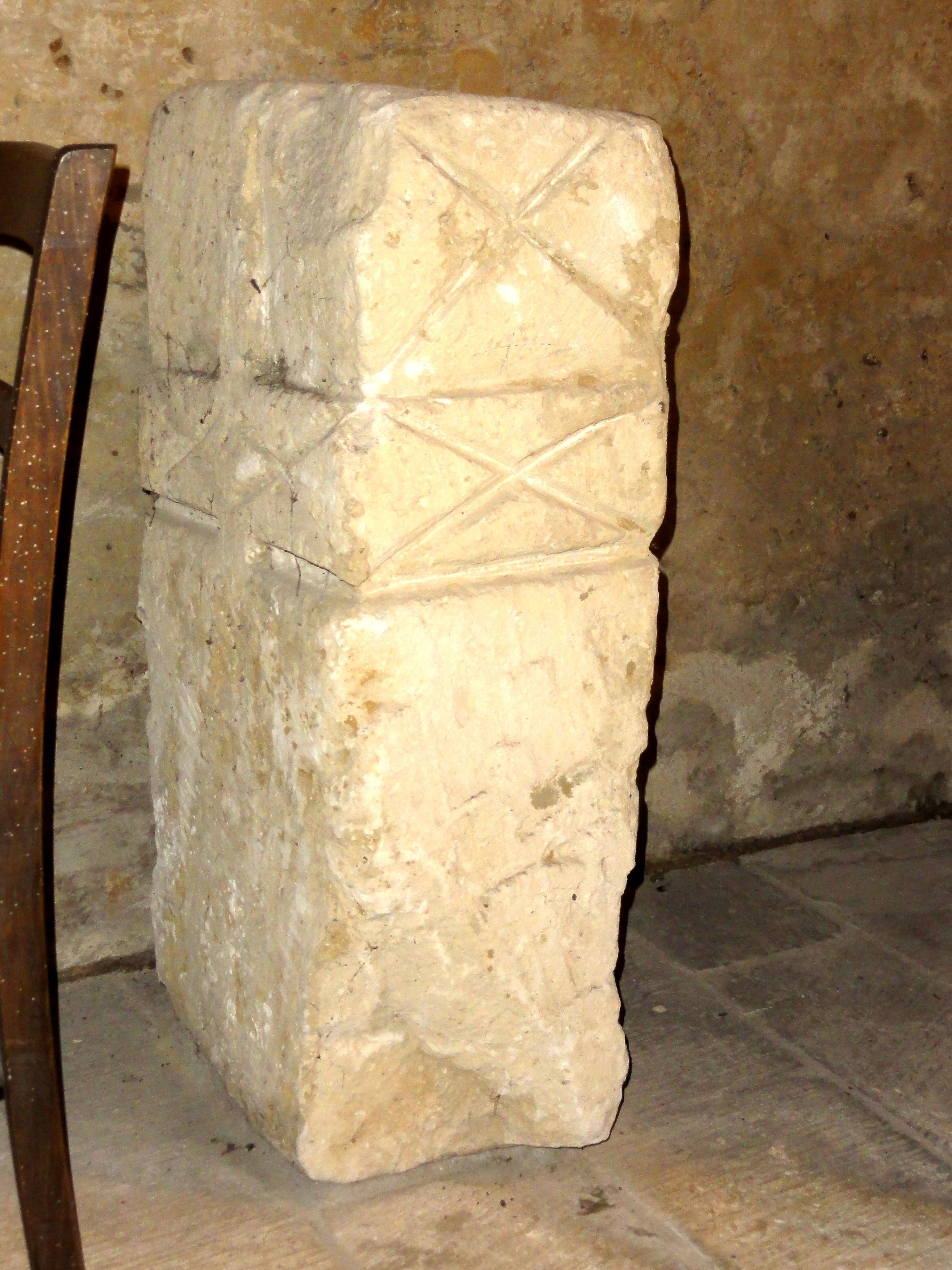 Bas-côté sud, vestige lapidaire.